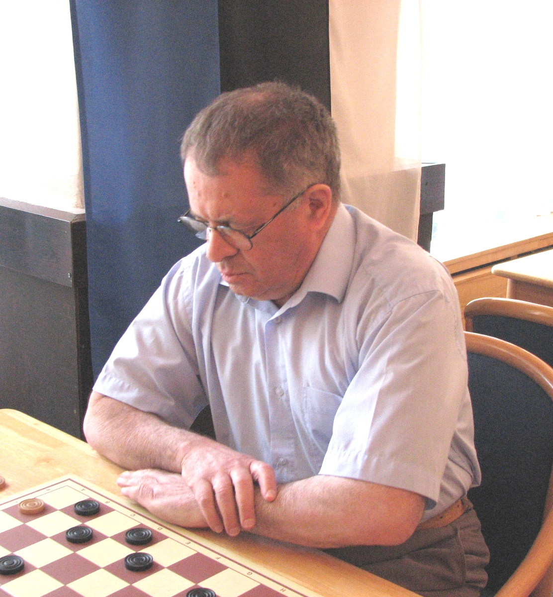 Jefim Titijevski mängimas Eesti välkkabe meistrivõistlustel